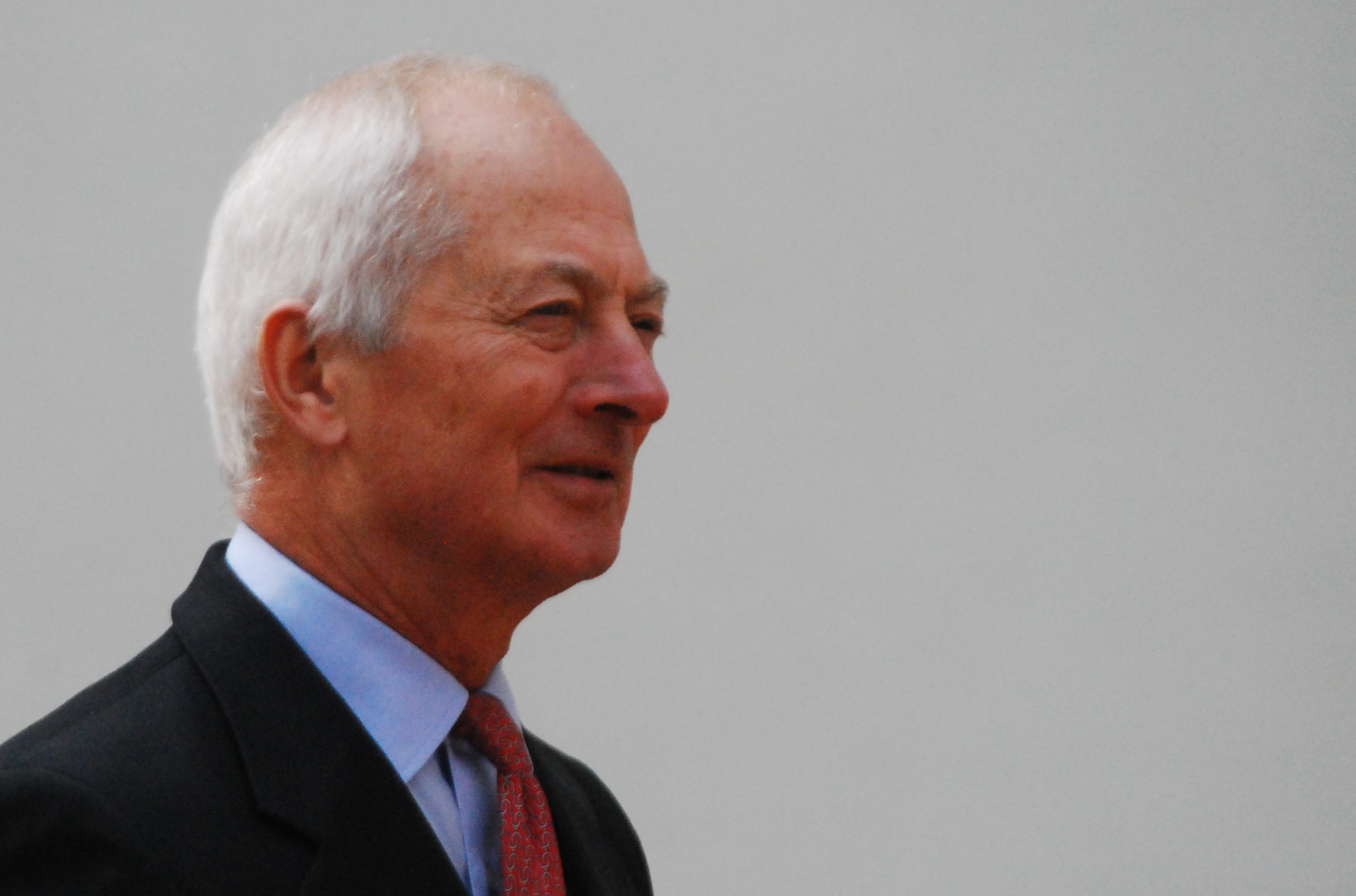 Fürst Hans-Adam II. von und zu Liechtenstein anlässlich eines Staatsbesuchs im Inneren Burghof in Wien